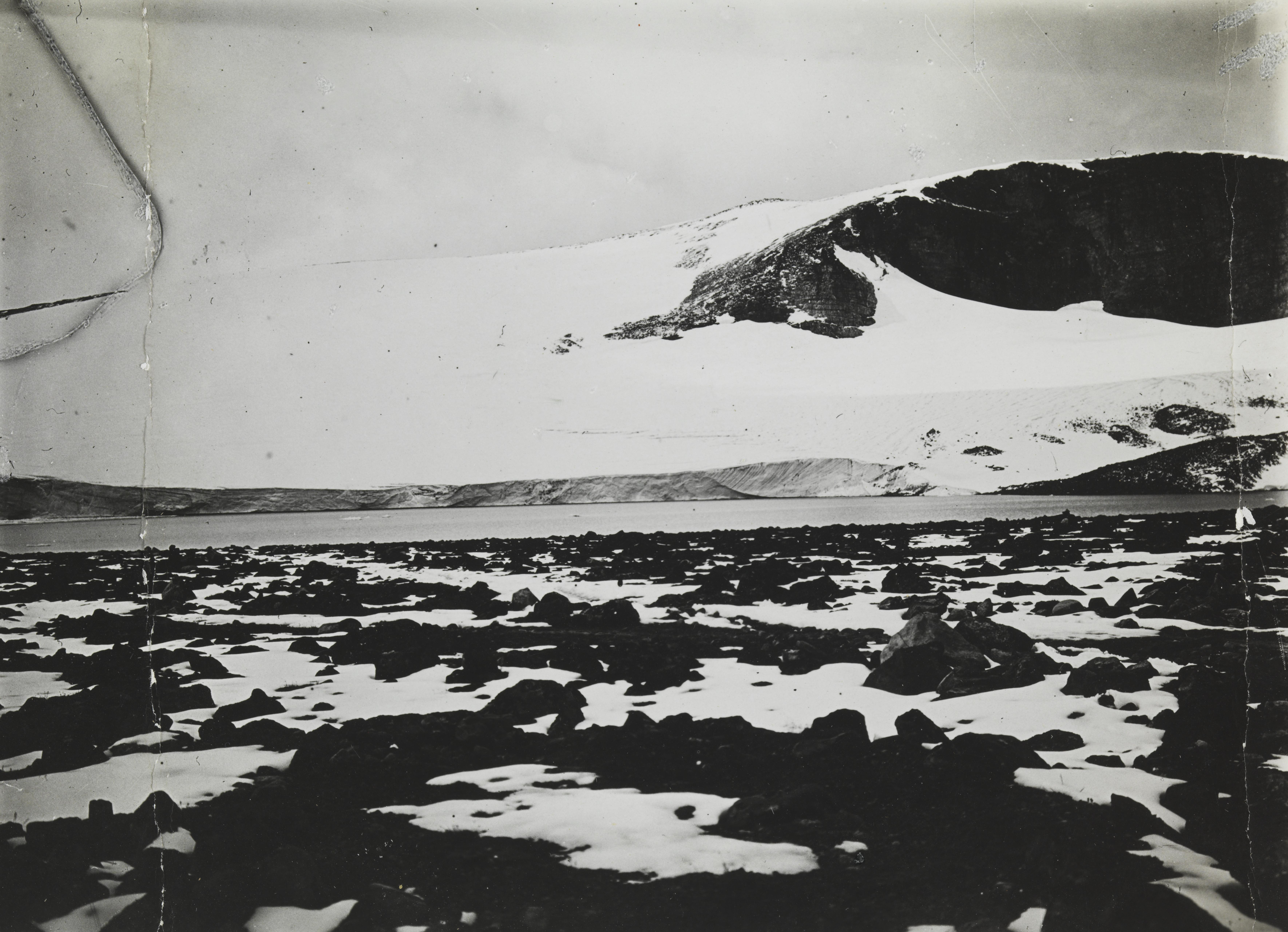 Bildet er hentet fra Nasjonalbibliotekets bildesamling Juvasshytta,Juvatn, Lom, Oppland